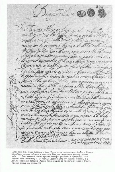 Писмо попа Мирчете и војводе Ивана папи Клименту 1675.године